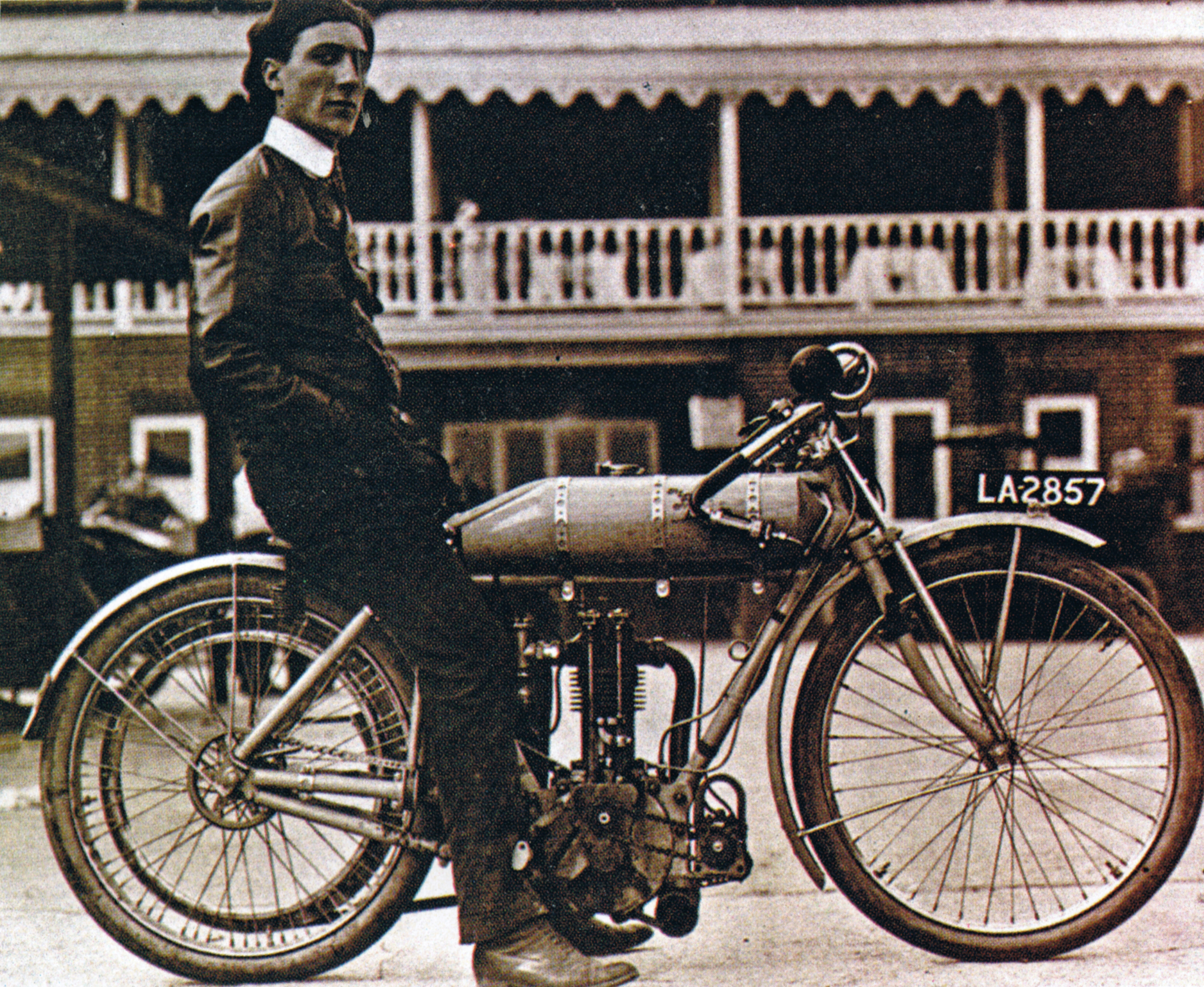 Bat Motorrad im Jahr 1910. Mit diesem Motorrad wurde 1910 ein neuer Bahnrekord mit über 80 Km/h bei der Tourist Trophy aufgestellt